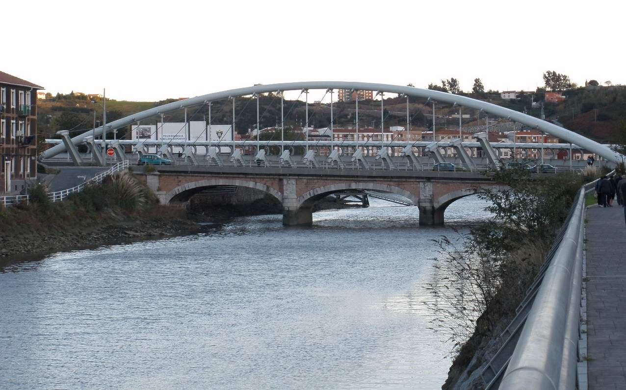 Puente sobre el rio Galindo (Barakaldo)